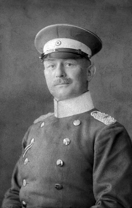 Oberstleutnant v. Lettow-Vorbeck